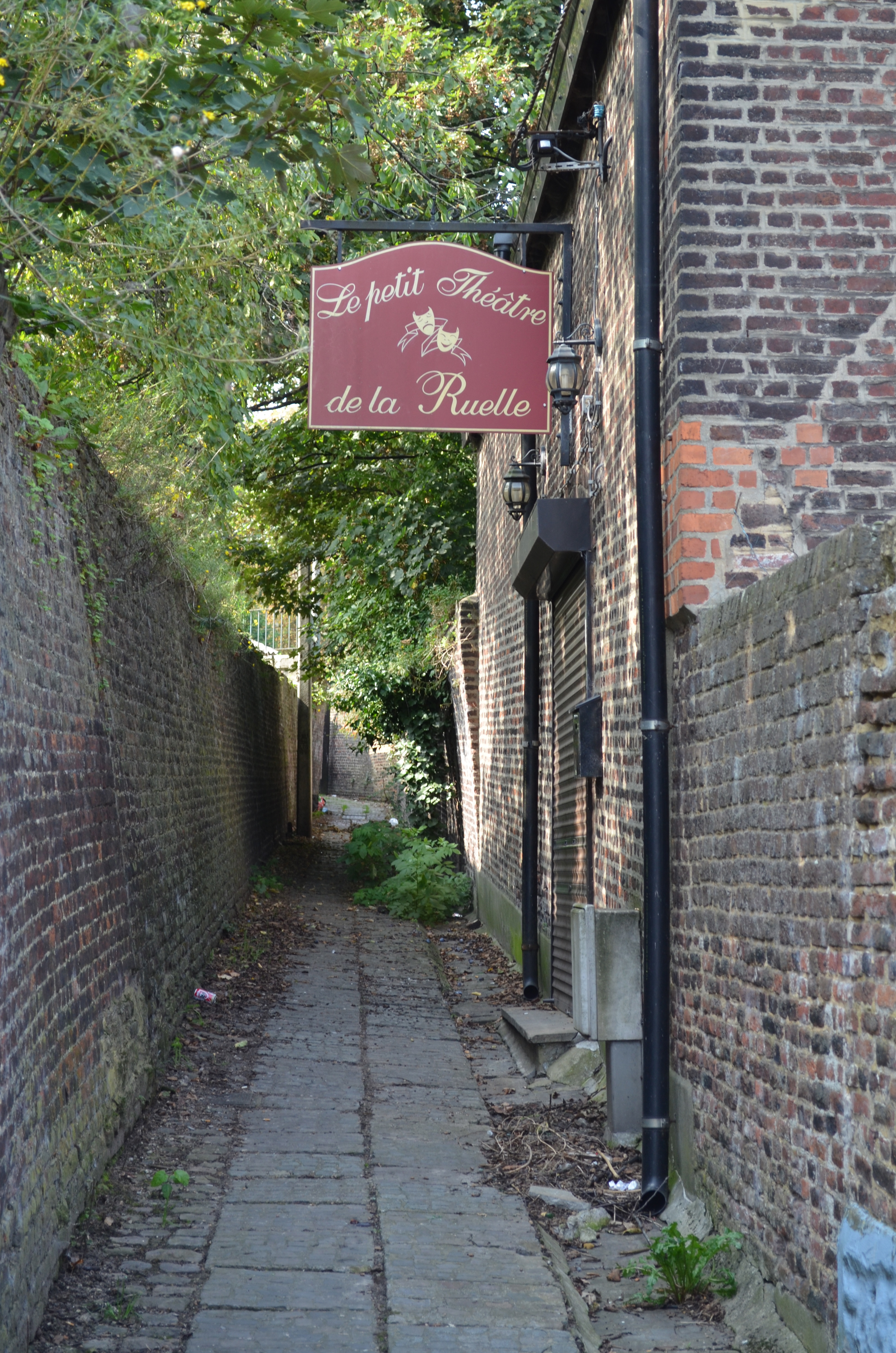 Lodelinsart (Charleroi-Belgique). Le petit théâtre de la Ruelle, situé rue du Village.